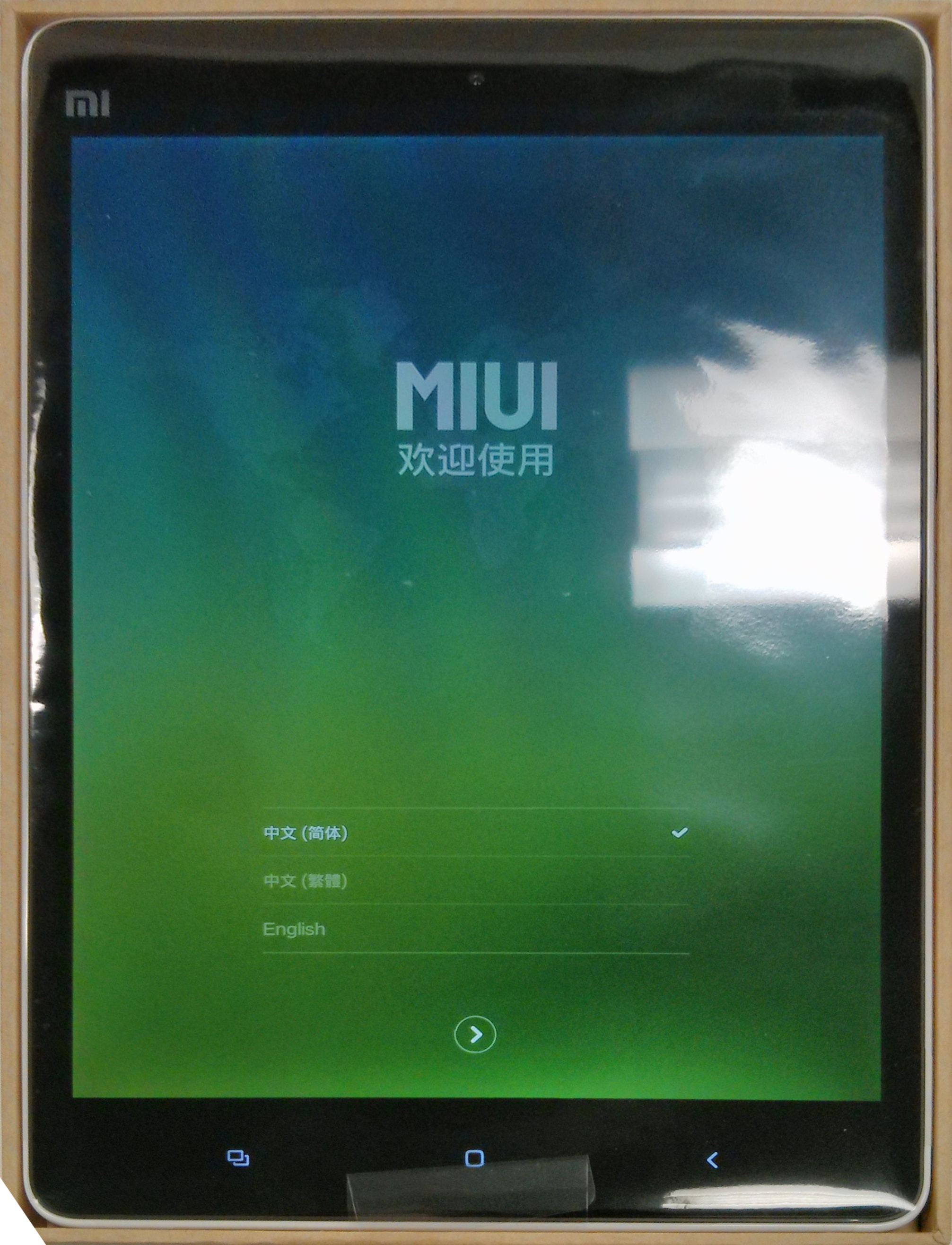 Déballage de la Xiaomi MiPad.